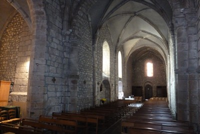 La nef - Eglise St Léger de Bessines-sur-Gartempe